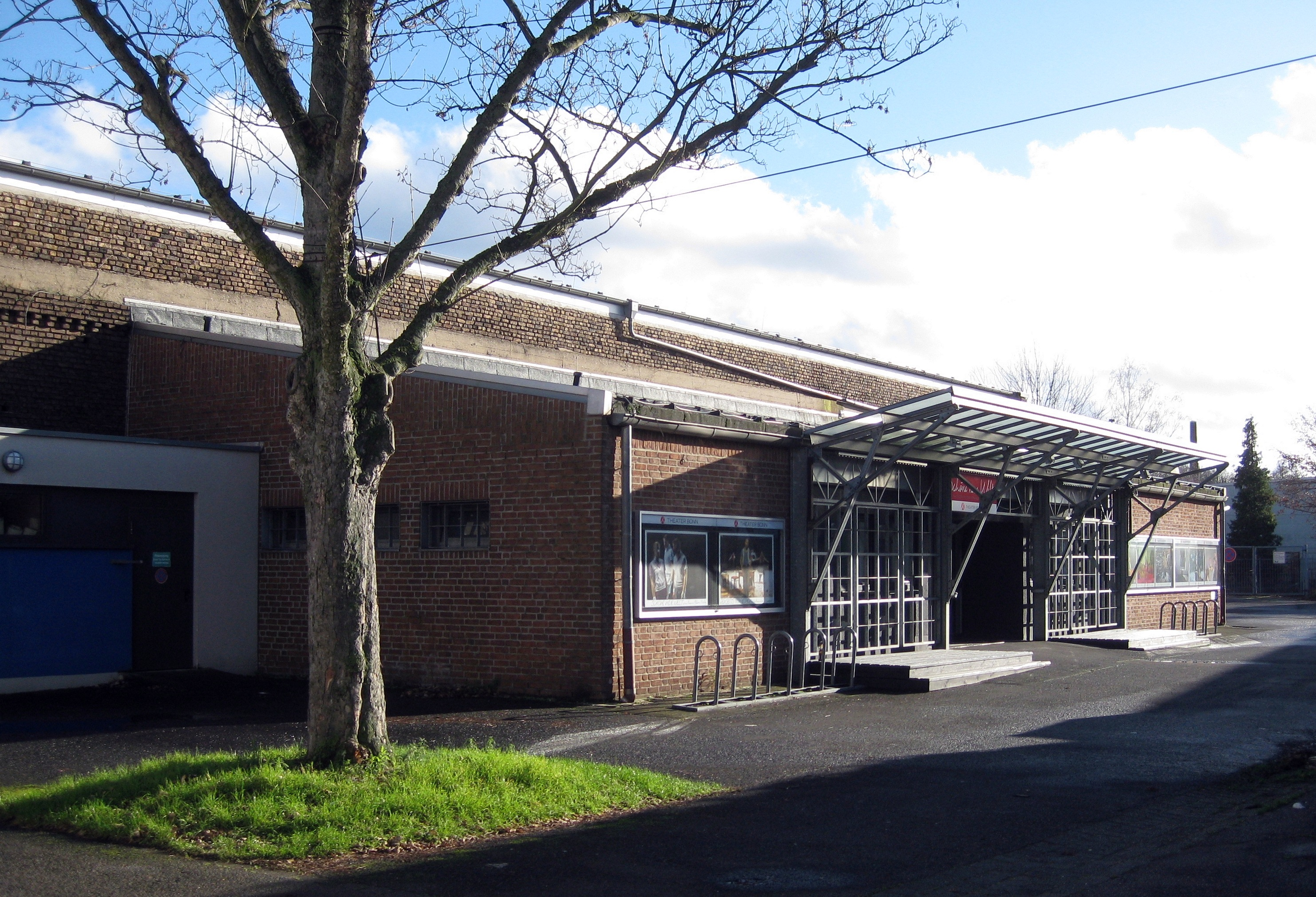 Deutschland, Bonn-Beuel, Siegburger Straße 42 (Bushaltestelle Pantheon Beuel): Halle Beuel auf den als Baudenkmal geschützten Fabrikanlagen einer ehemaligen Jutefabrik (gegr. 1868). Seit 1981 ist das Gelände im Besitz der Stadt Bonn. Zum Zeitpunkt der Aufnahme war das Bonner Theater (Schauspiel & Oper) Nutzer des Hallenkomplexes mit seinen Schauspielhallen; genannt „Halle Beuel“. Dort sind neben Probe- und Aufführungsbühnen auch Verwaltungsbüros, Werkstätten für Bühnenbau, Kostümschneiderei, Maskenbildnerei und Lager untergebracht. Für Publikumsaufführungen wurden drei Hallen genutzt: die eigentliche "Halle Beuel", das "Lampenlager" und der "Alte Malersaal". Auf dem Gelände verfügt auch die Freiwillige Feuerwehr Beuel über Garagen mit Einsatzfahrzeugen und ein Büro.